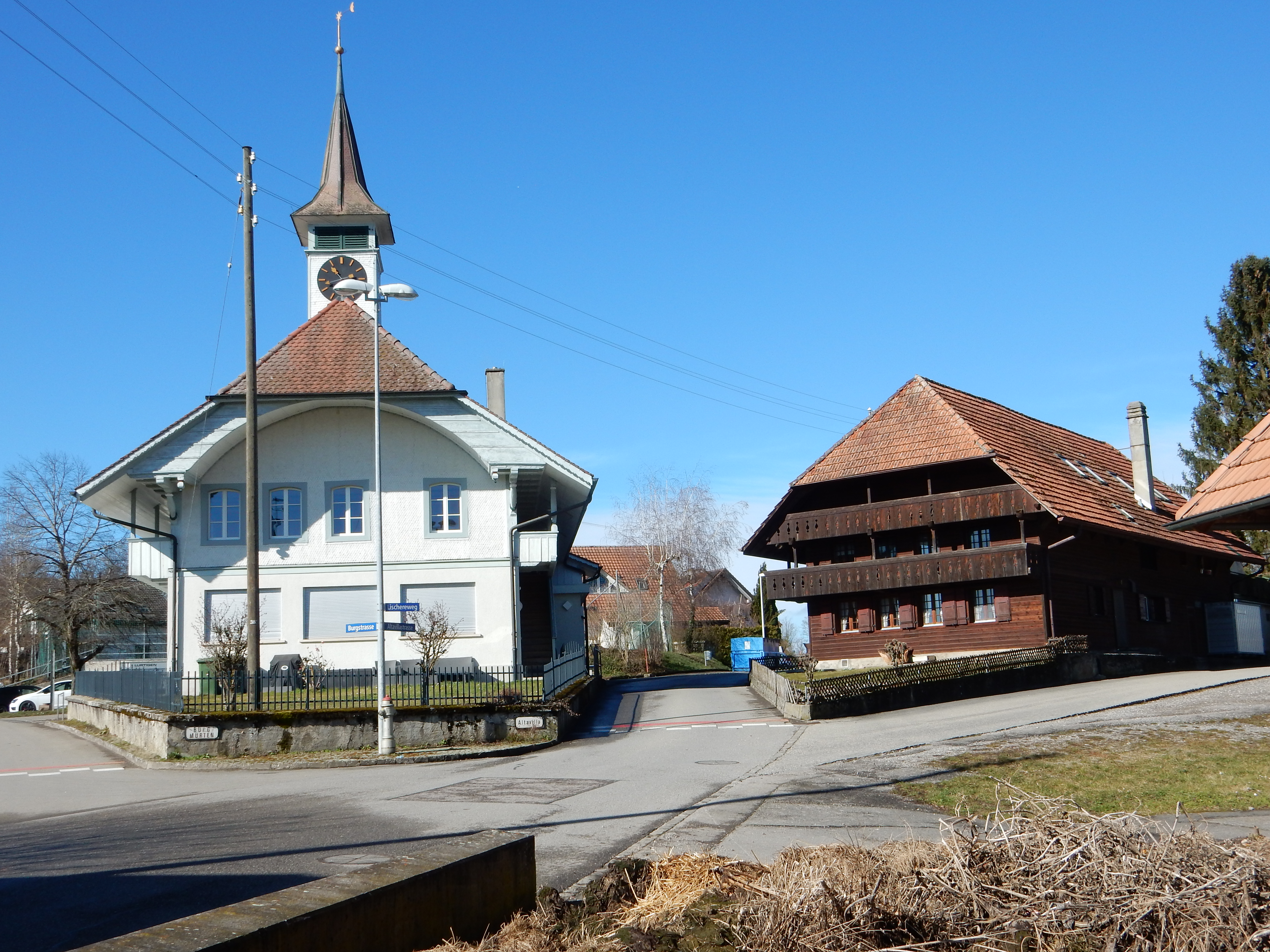 Lurtigen, Schulhaus (1812), Kanton Freiburg, Schweiz